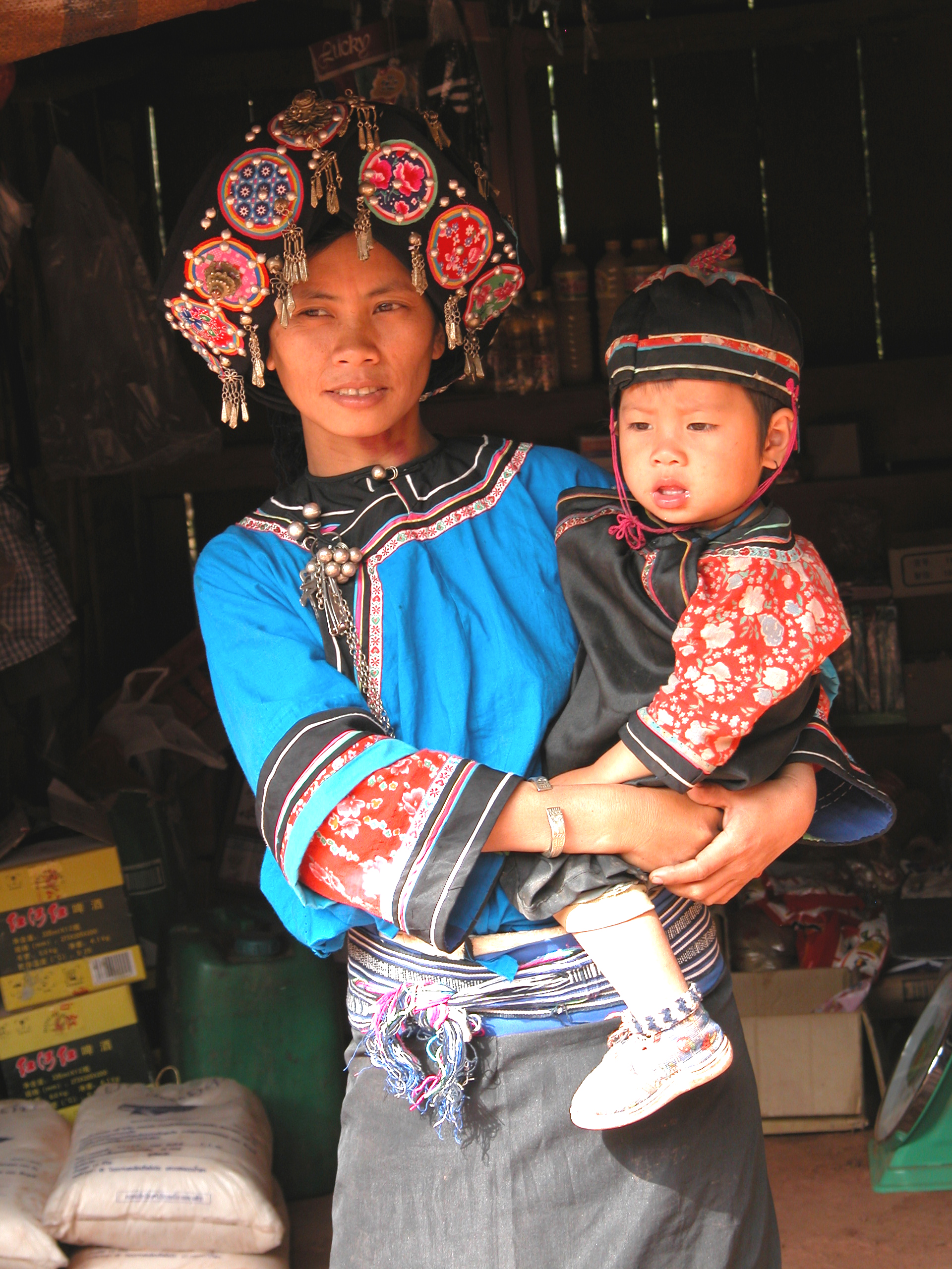 laos, région de Phongsaly femme et enfant Ho